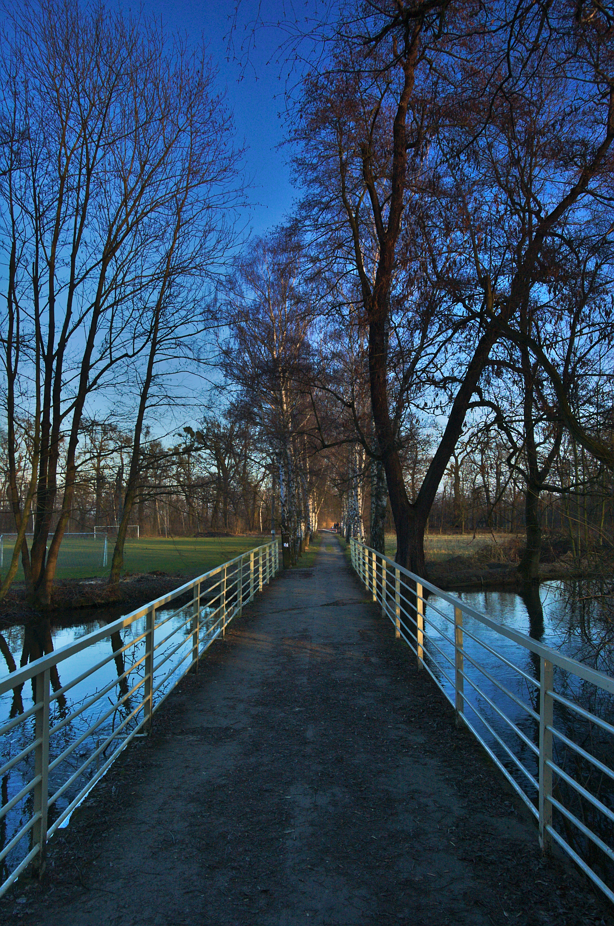 Most přes Mlýnský náhon a cesta k rybníku Kolečko, Tovačov, okres Přerov